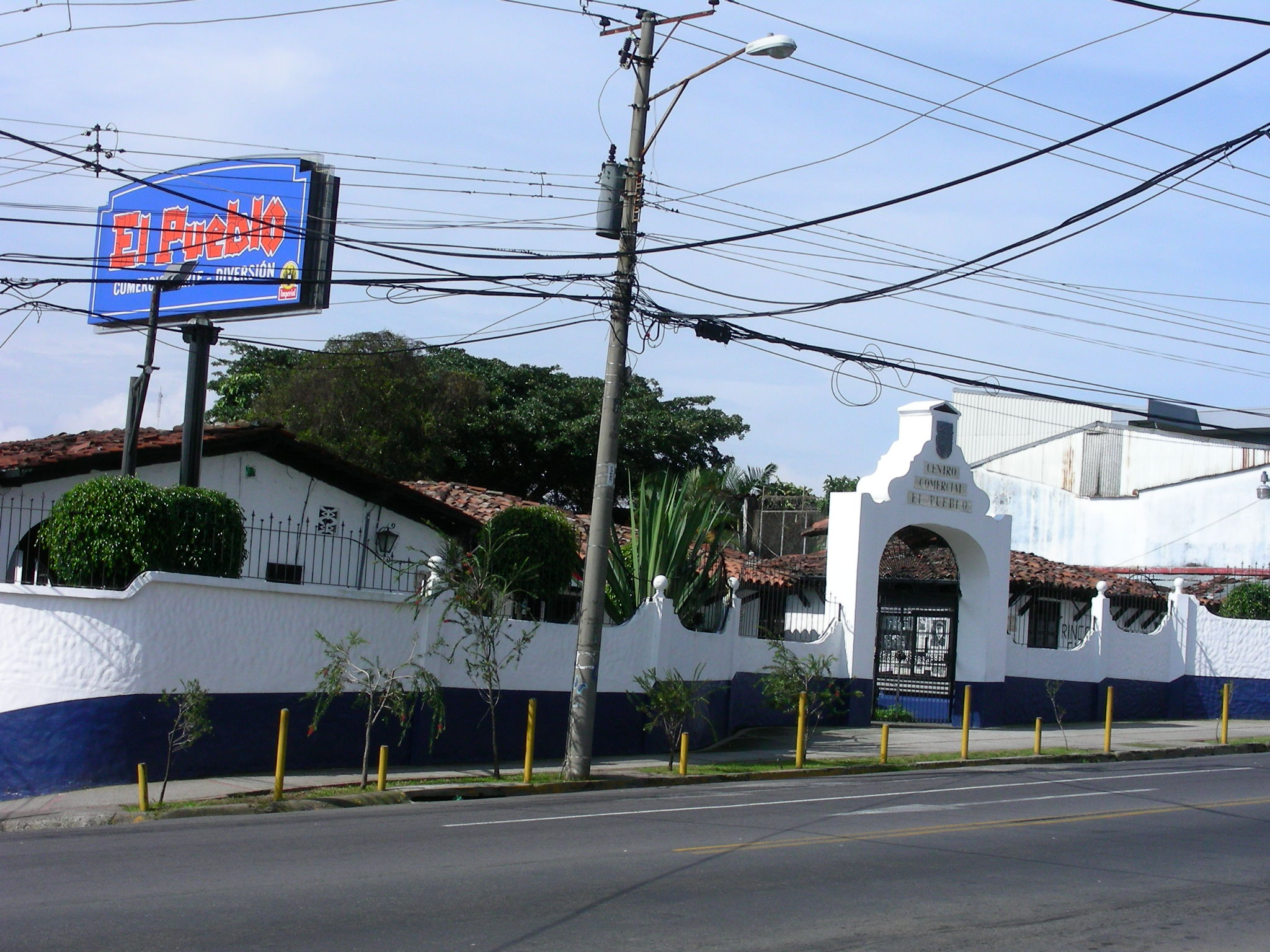 Centro Comercial El Pueblo, San Francisco, Goicoechea, San José, Costa Rica